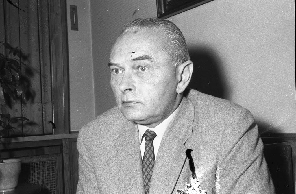 Oberbürgermeister a.D. und Verleger der Kieler Nachrichten (KN) Willi Koch